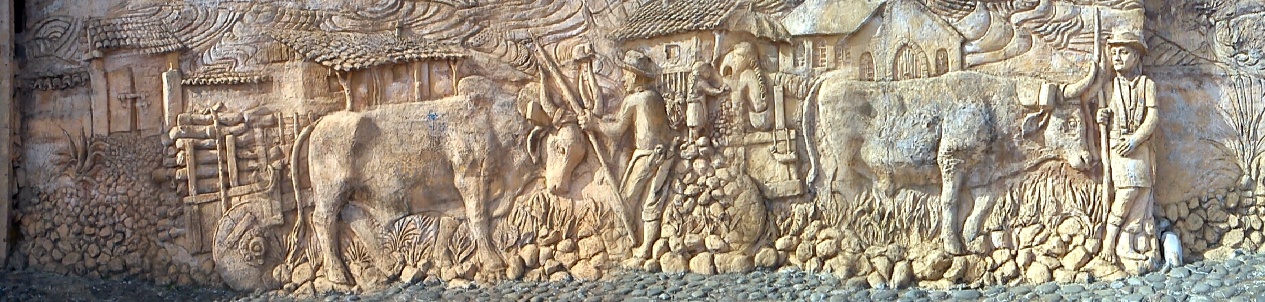 Panorámica del Monumento al Boyero y la Carreta Costarricenses en San Antonio de Escazú, Costa Rica.